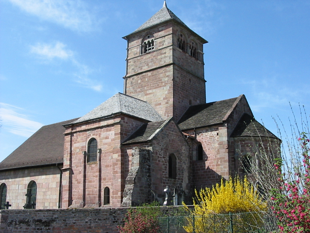 Champ-le-Duc Commune des Vosges L'église de l'Assomption de Notre-Dame, romane Photographie personnelle, prise le 23 avril 2006 Copyright © Christian Amet